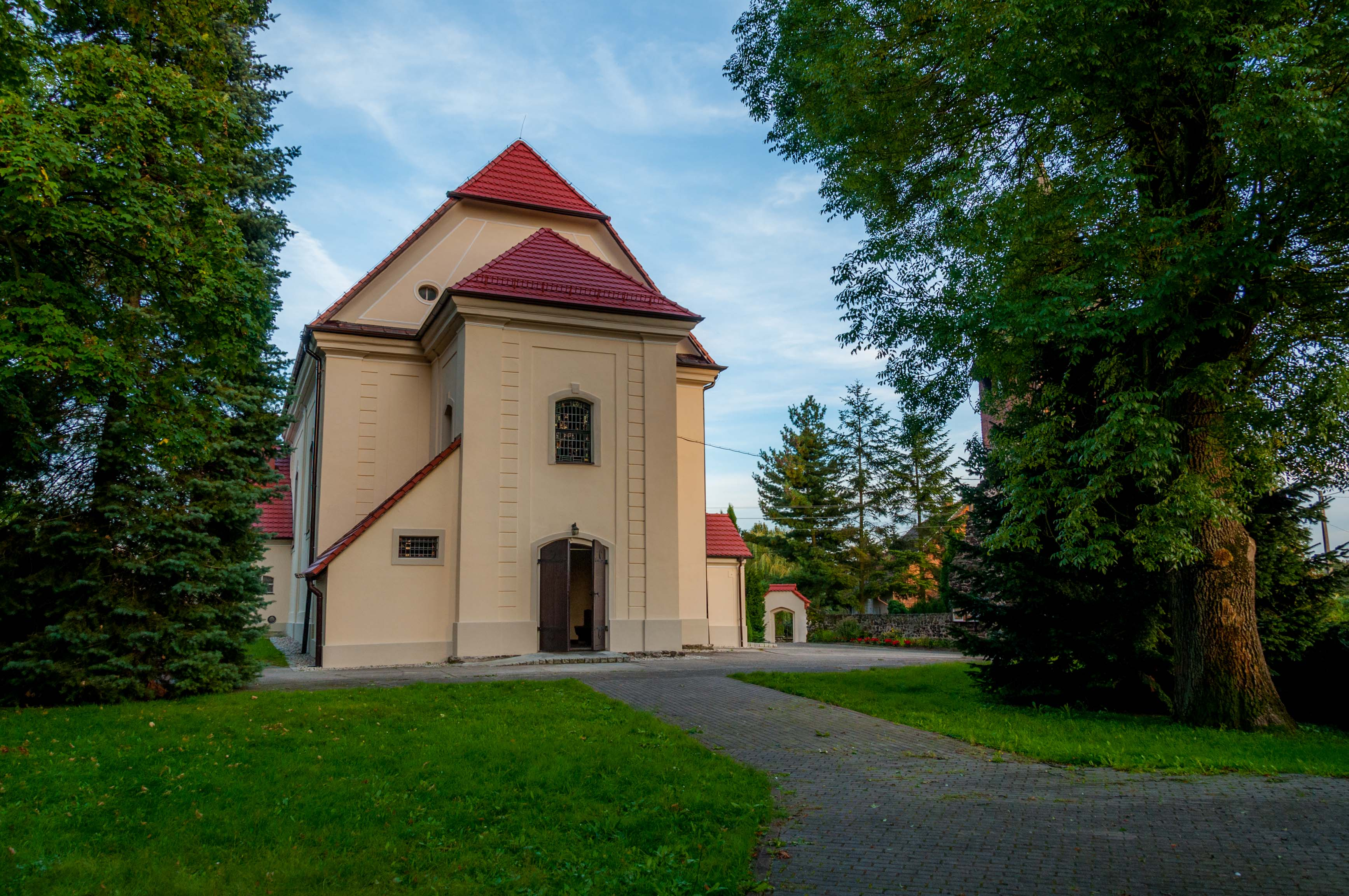 Chróścina, kościół par. p.w. śś. Piotra i Pawła, 1792, XX